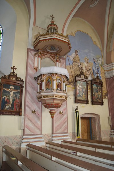 Lubrza – kościół parafialny p.w. św. Jakuba, 1600, XVIII w. (zabytek nr 567/59 z 3.04.1959)